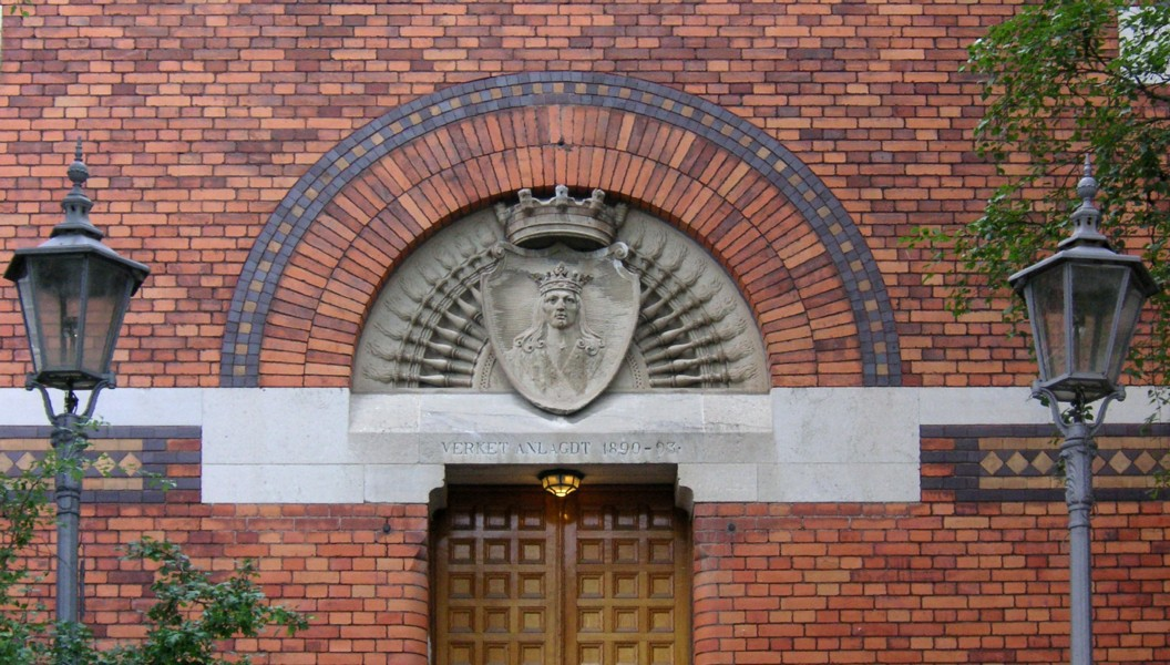 Entrén till pumpcentralen på gasverket